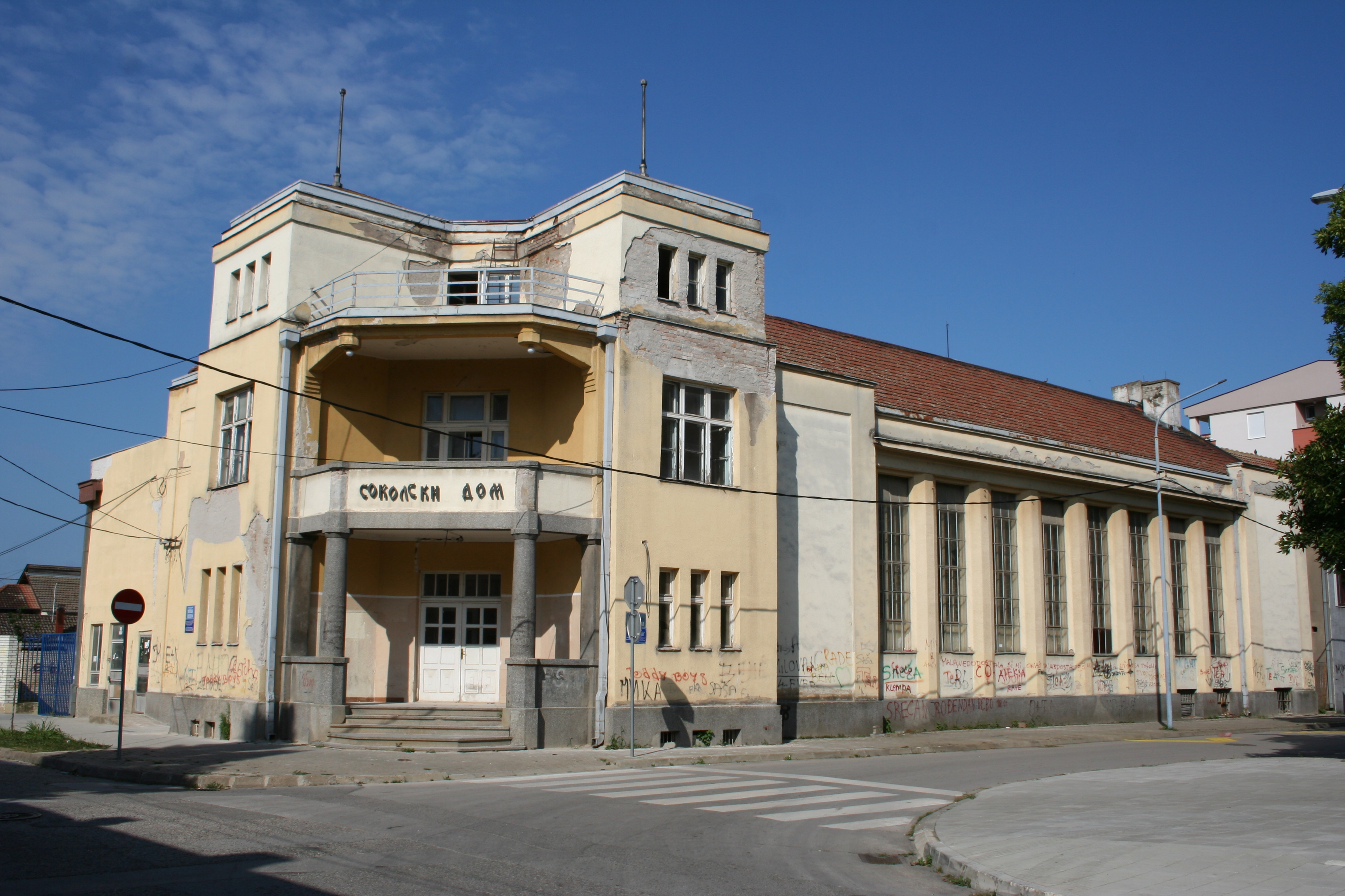 Zgrada Sokolskog doma u Šapcu